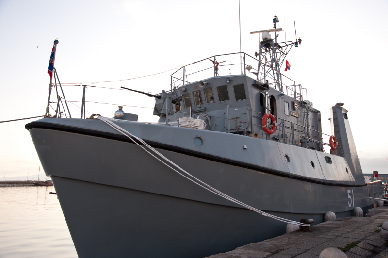 Dan HRM-a, Rijeka